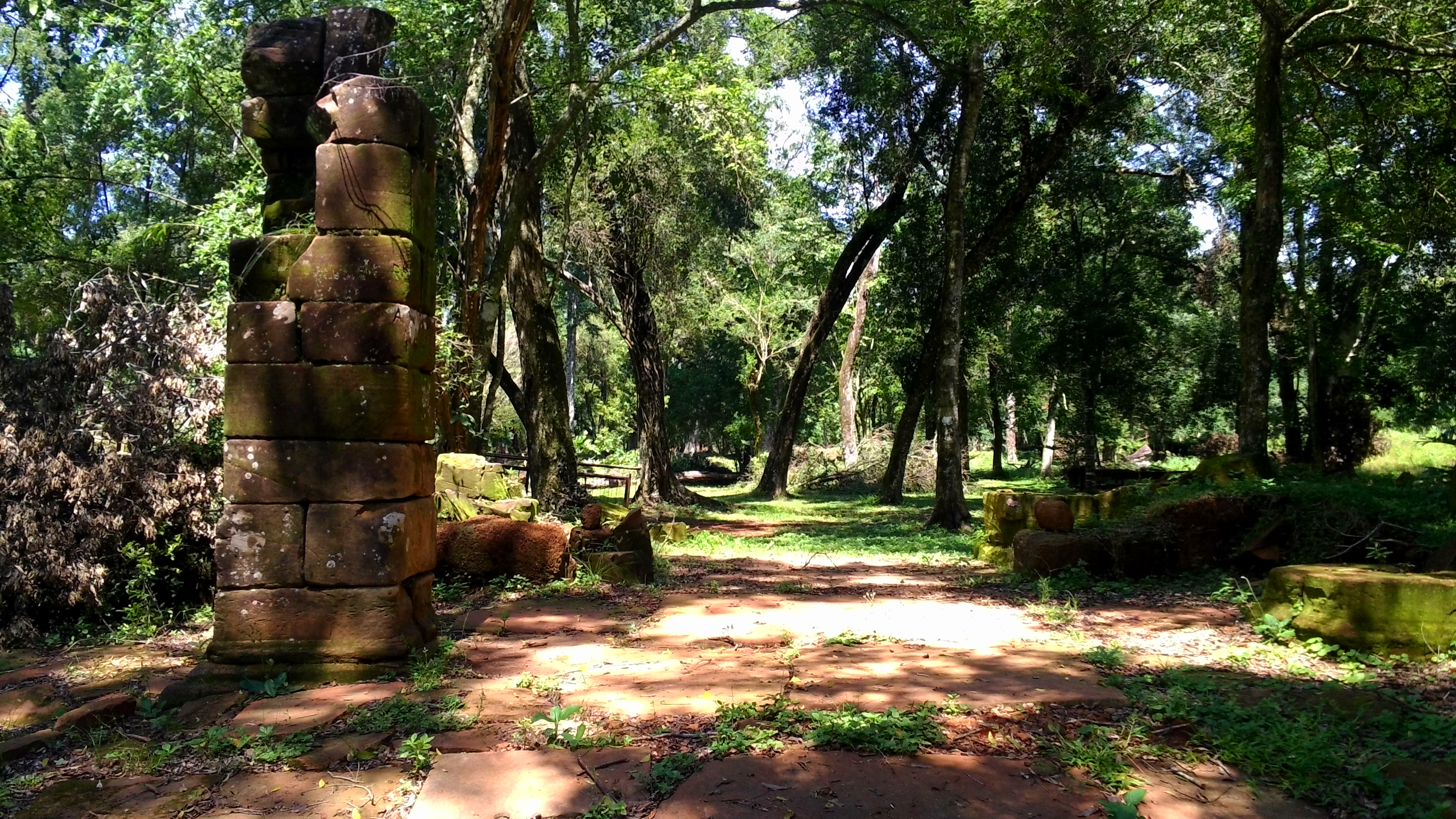 Iglesia